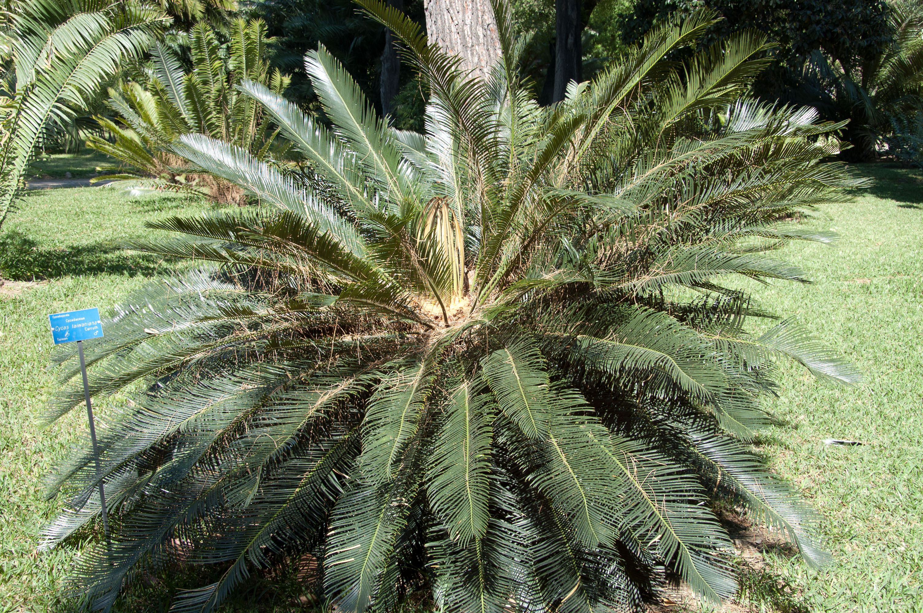 Cycas taiwanianaOrto botanico di Palermo